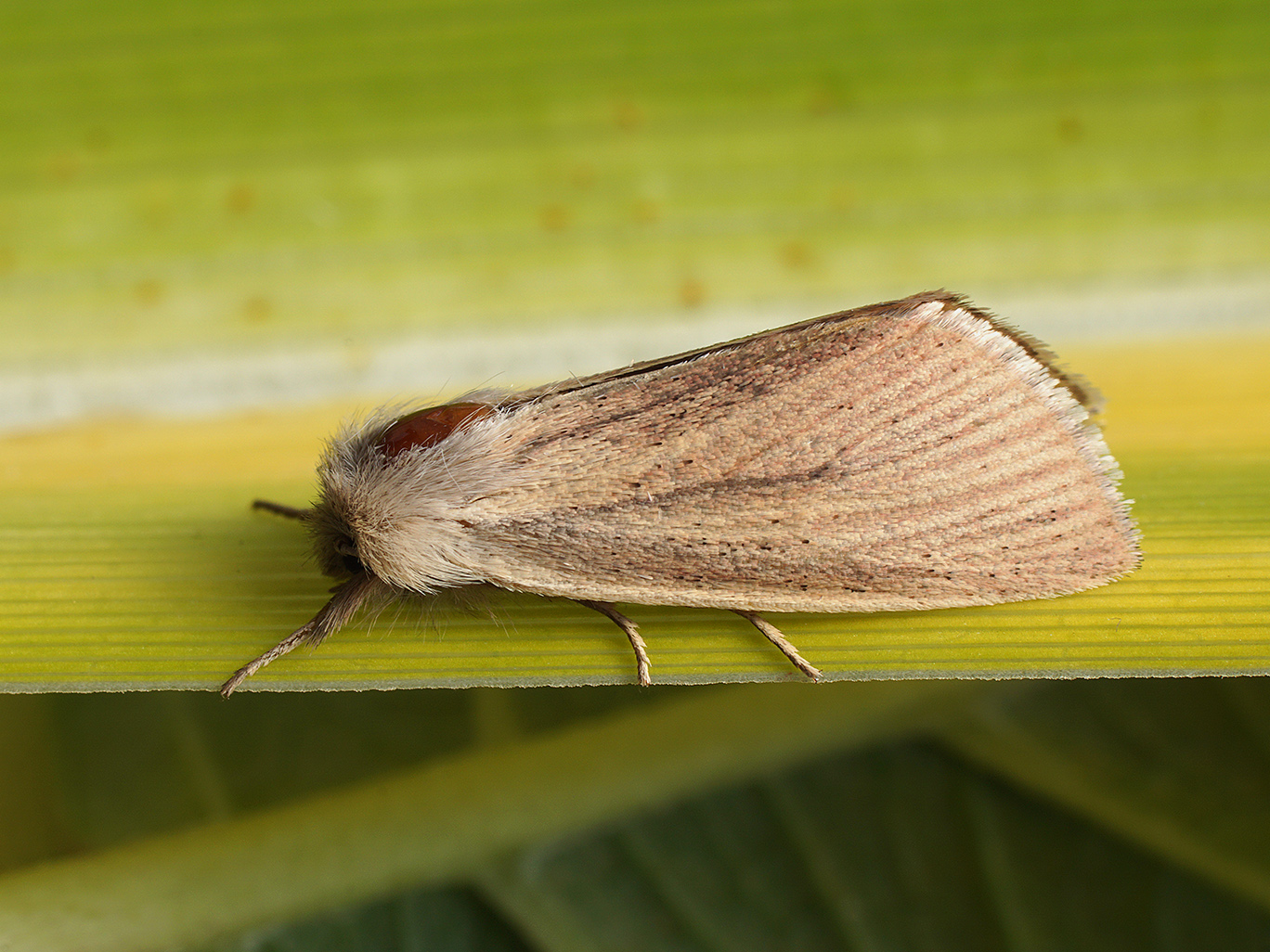 Exemplar found: Russia, Moscow Oblast, Odintsovsky District, near village Pestovo, 22.09.2018, by light МО, Одинцовский р-н, окрестности деревни Пестово, 22.09.2018, на свет